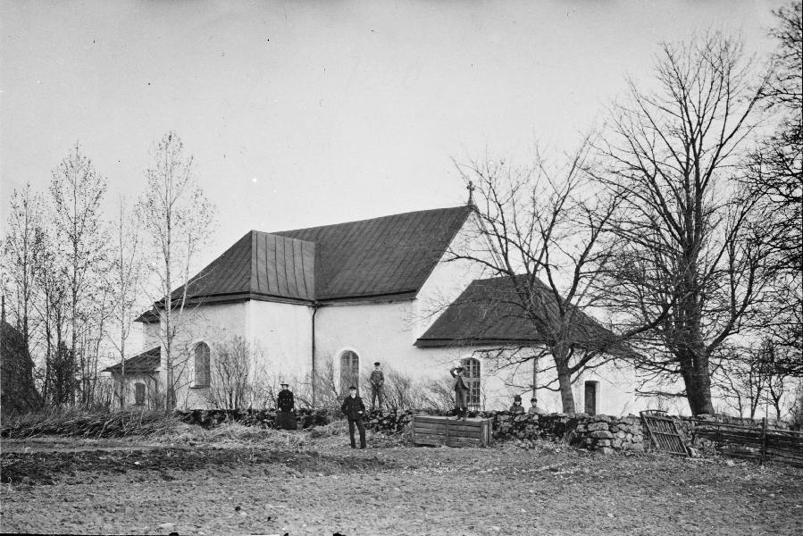 Sveneby kyrka